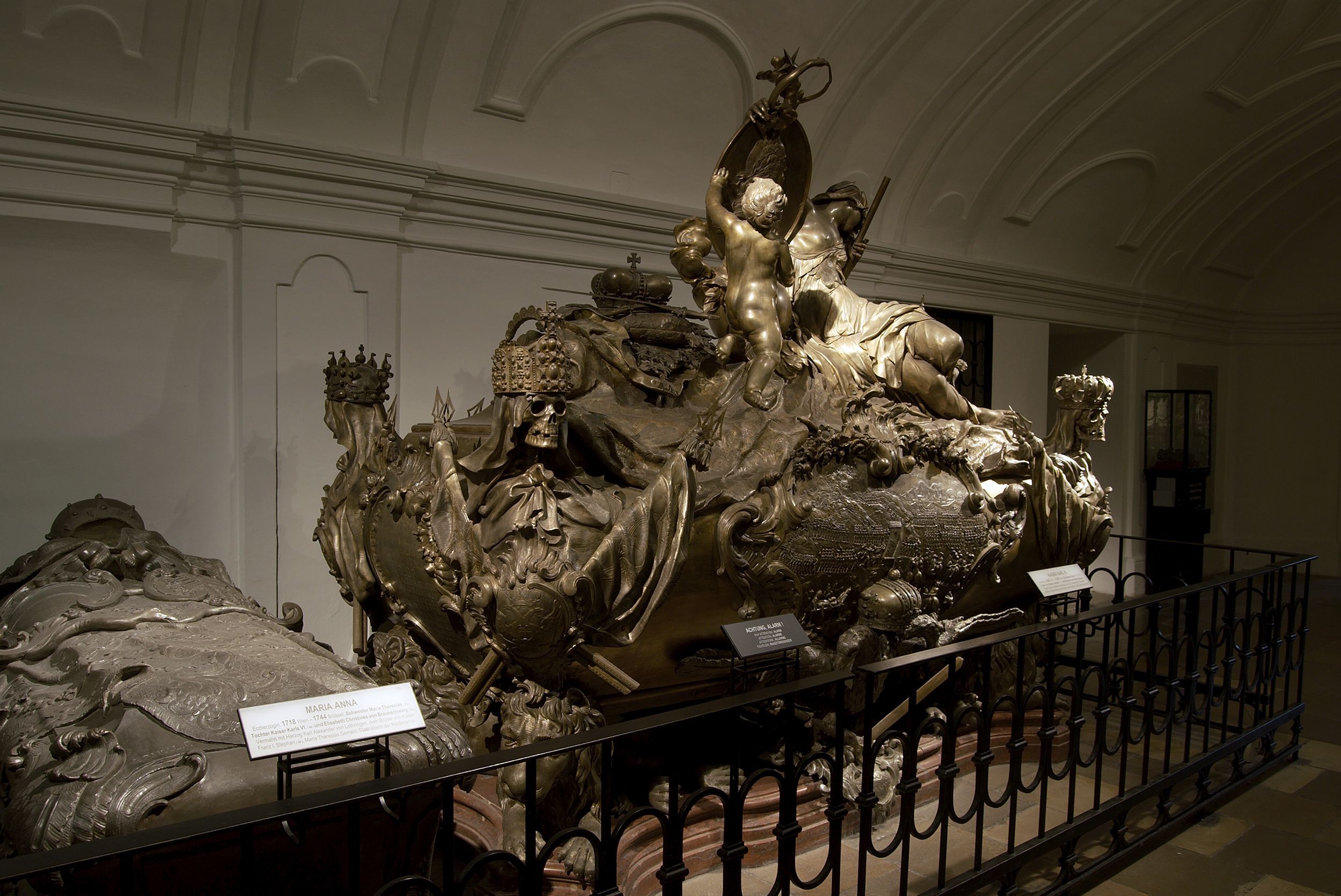 Hrob císaře Karla VI. v císařské hrobcce ve Vídni